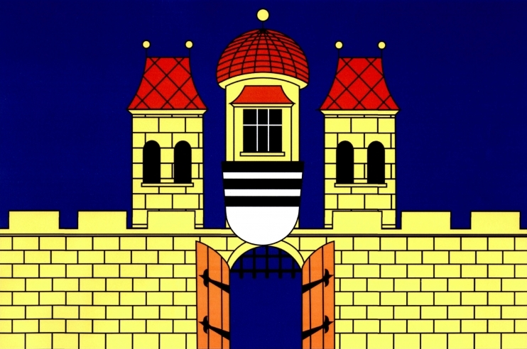 vlajka, Jevišovice, okres Znojmo